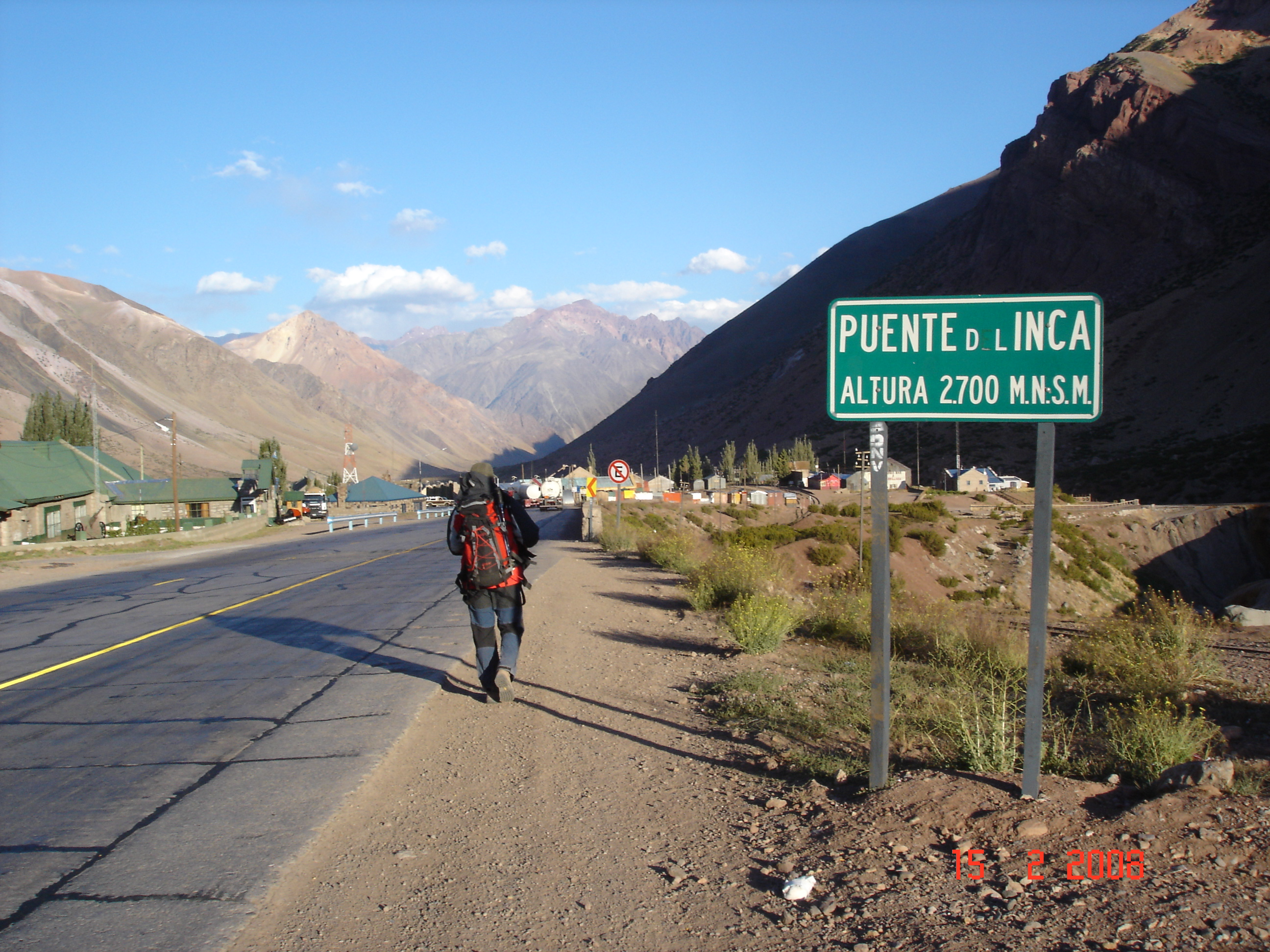 Puente del Inca near Aconcagua